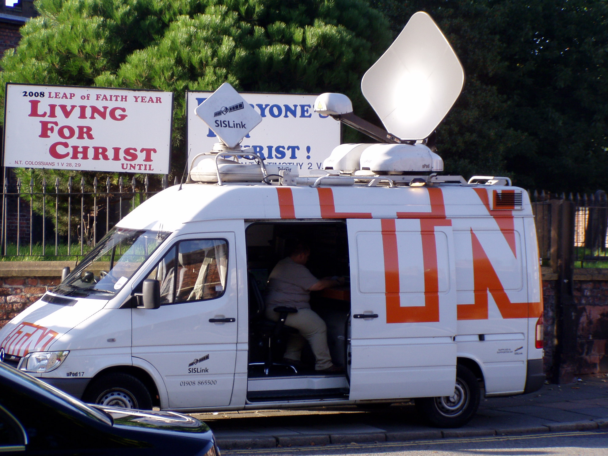 ITN OB Van in Liverpool